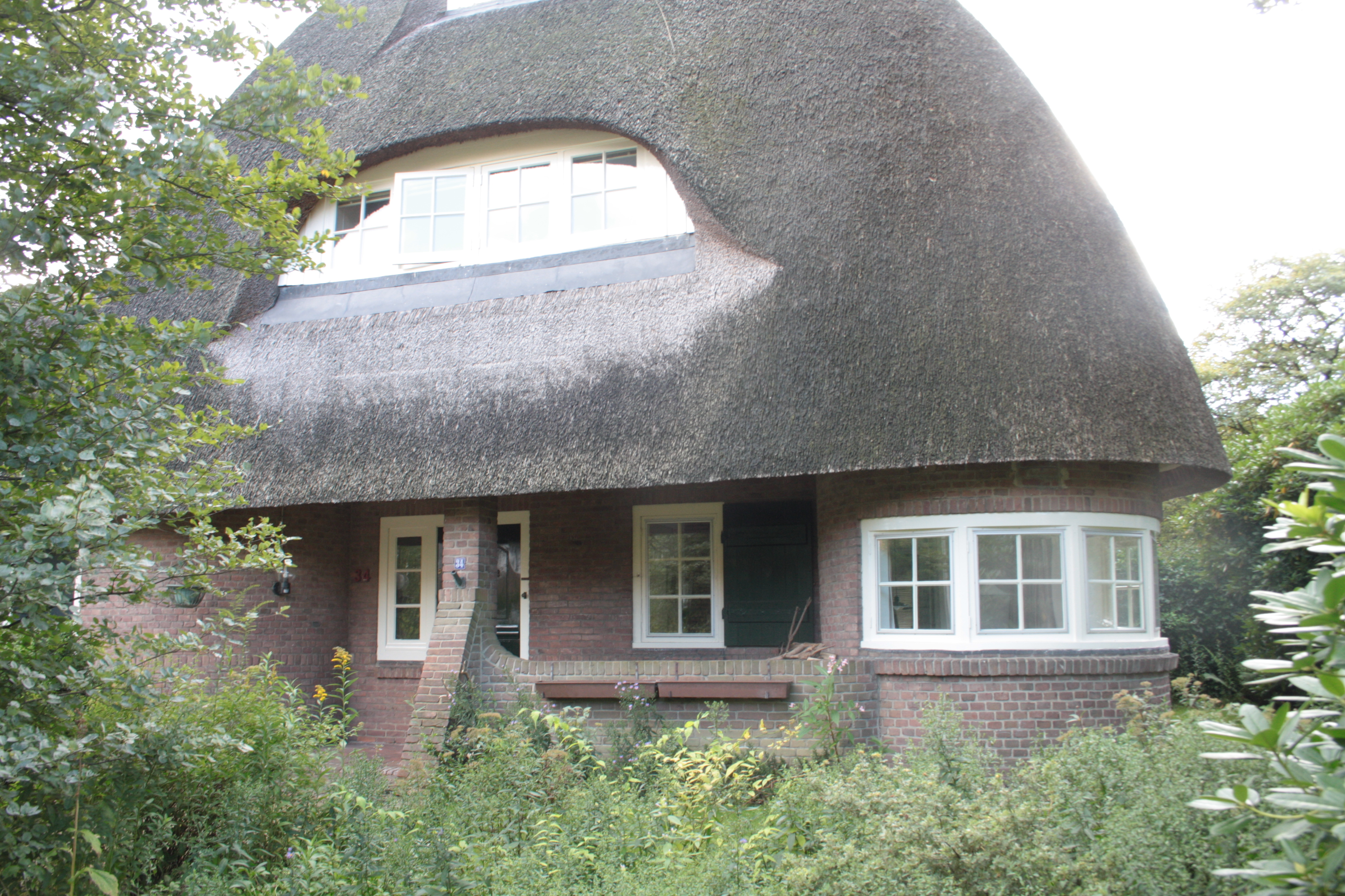 Amersfoort, Schaepmanlaan Complex middenstandswoningen: woonblok C